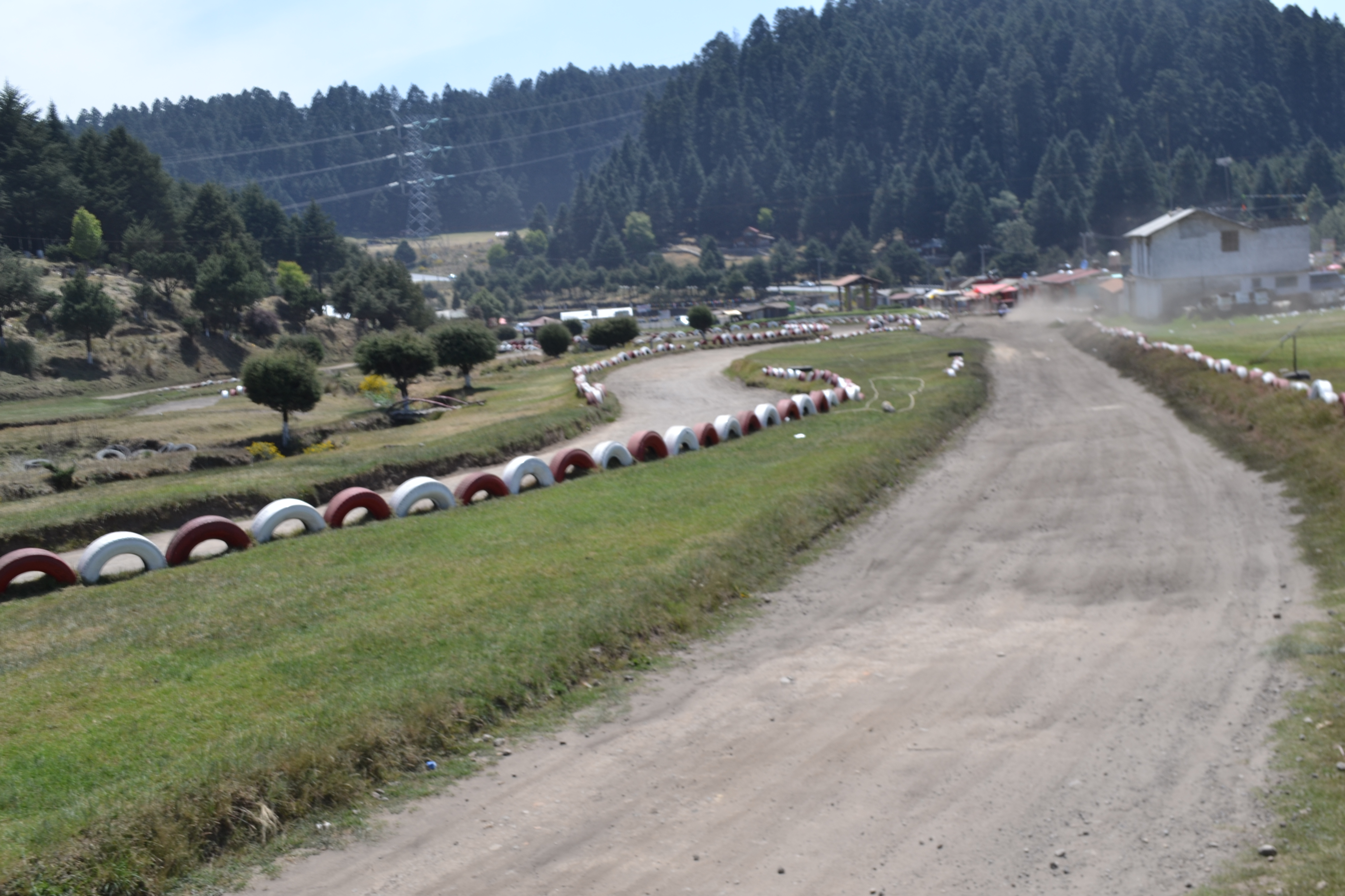 Uno de los diferentes caminos que conectan los diferentes valles